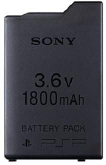 Bild på ett batteri till Playstation Portable